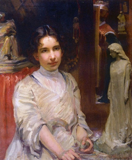 Portrait of Bessie Potter Vonnoh (1872-1955)